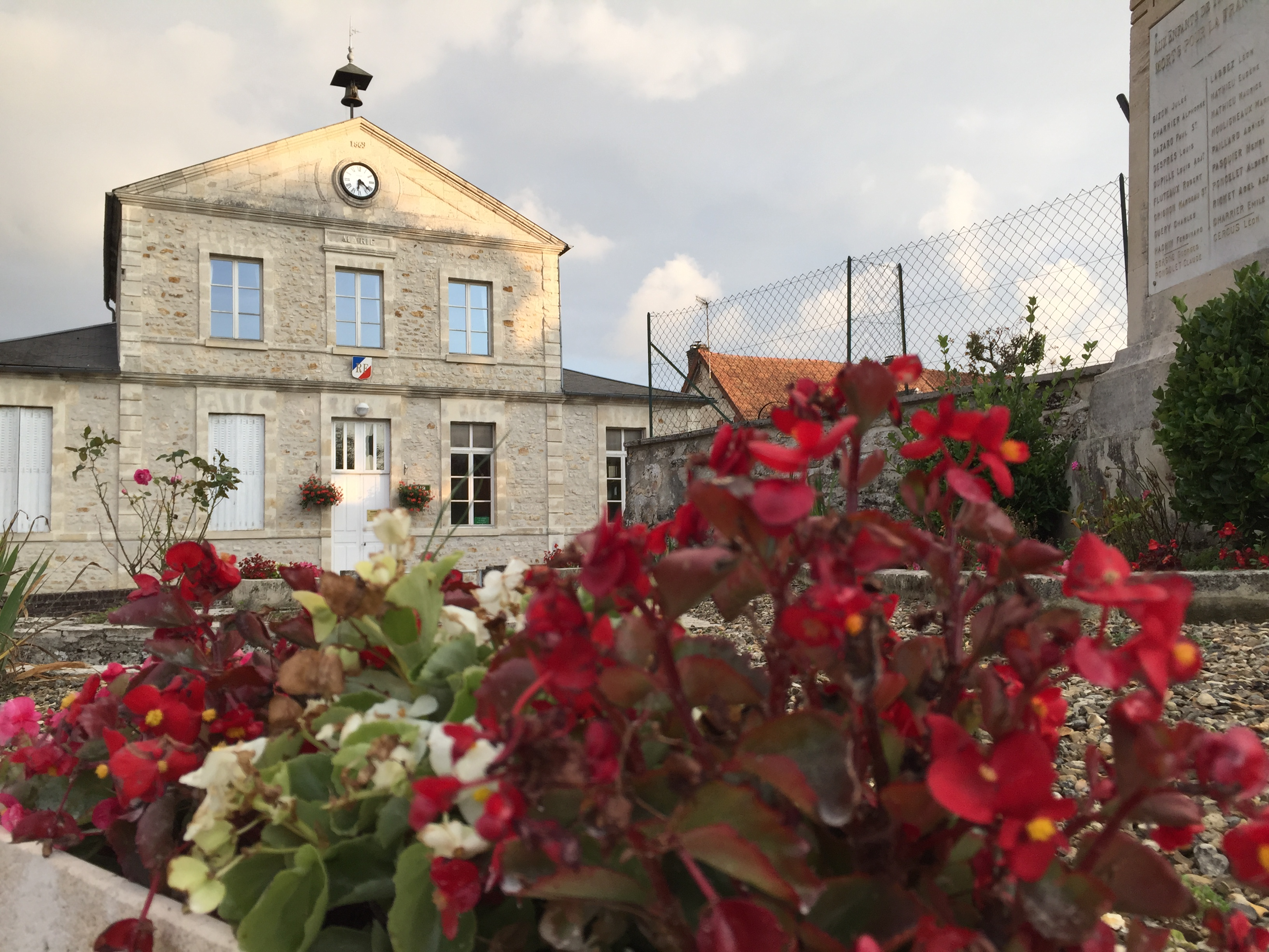 Troësnes, la Mairie